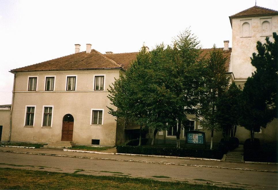 Conacul Paget din Câmpia Turzii